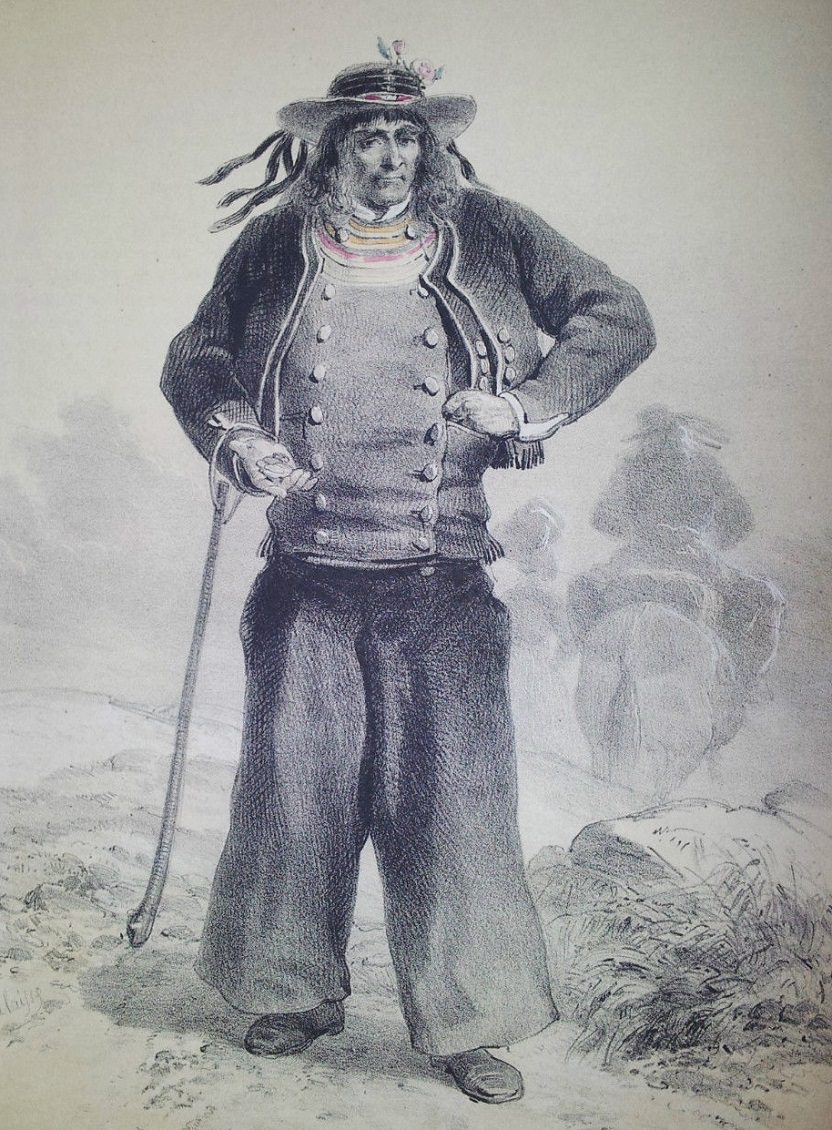 François Hippolyte Lalaisse : Homme de Pont-l'Abbé (Galerie armoricaine, 1848)